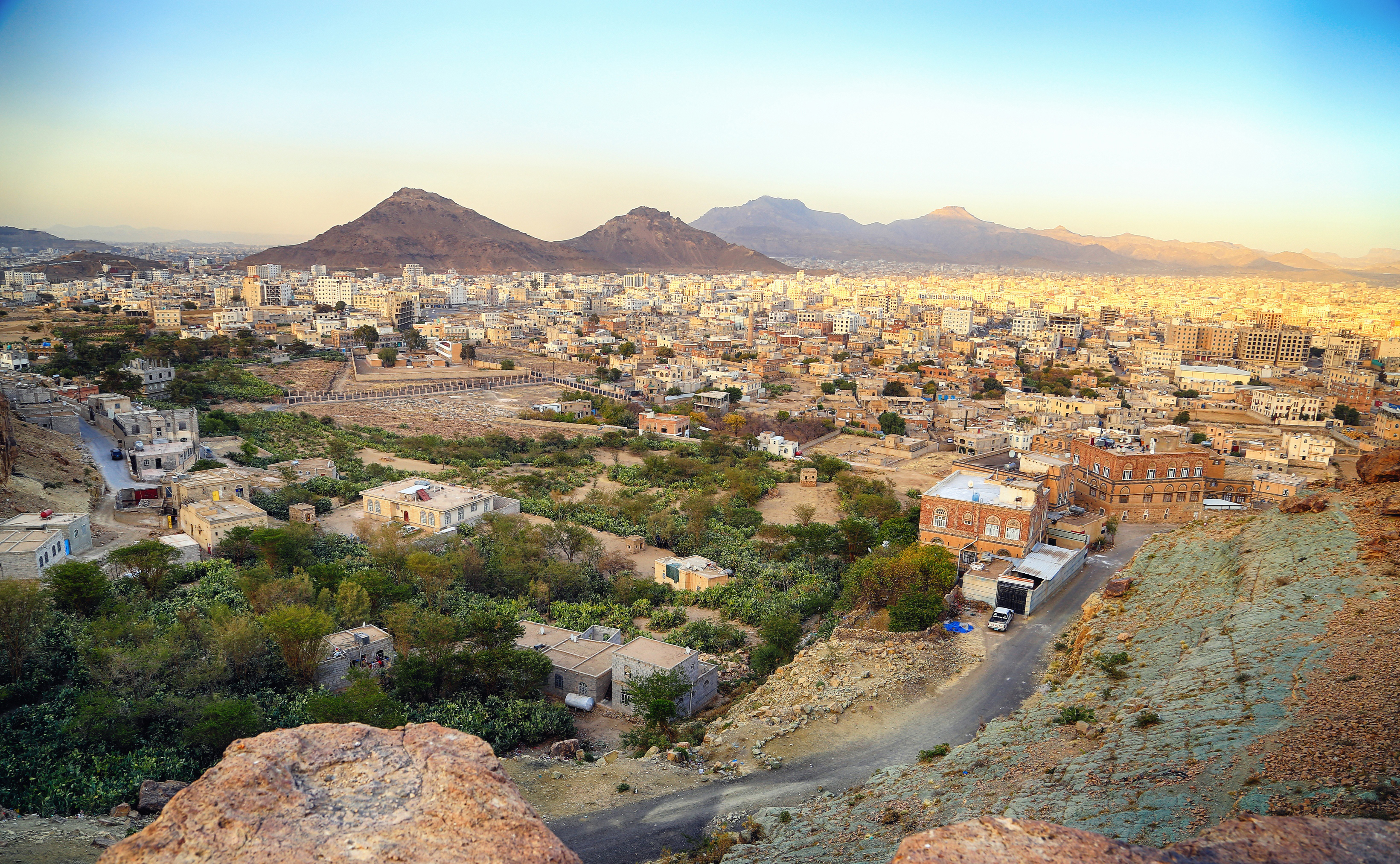 By: AnasALhajj.Photography